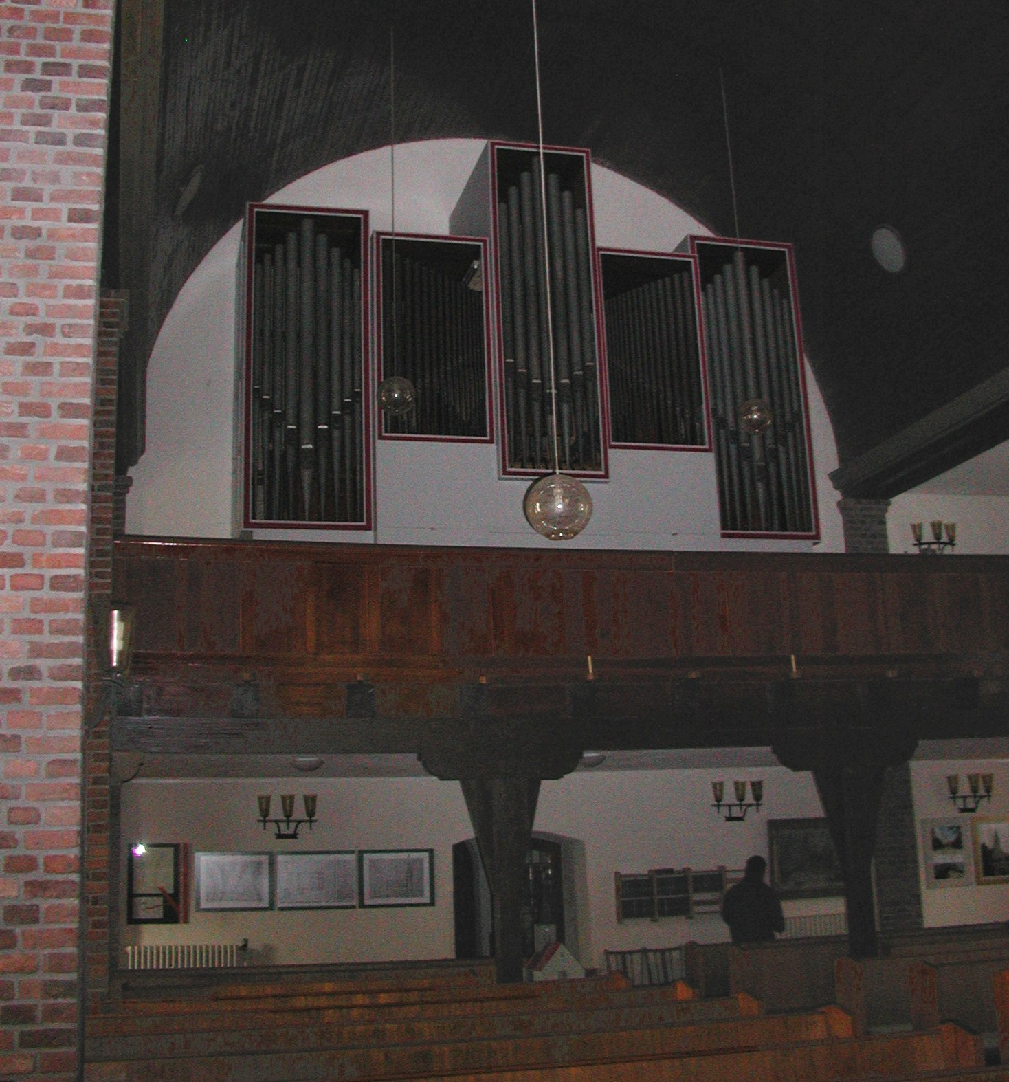 Orgelempore in der Dorfkirche Friedrichsfelde